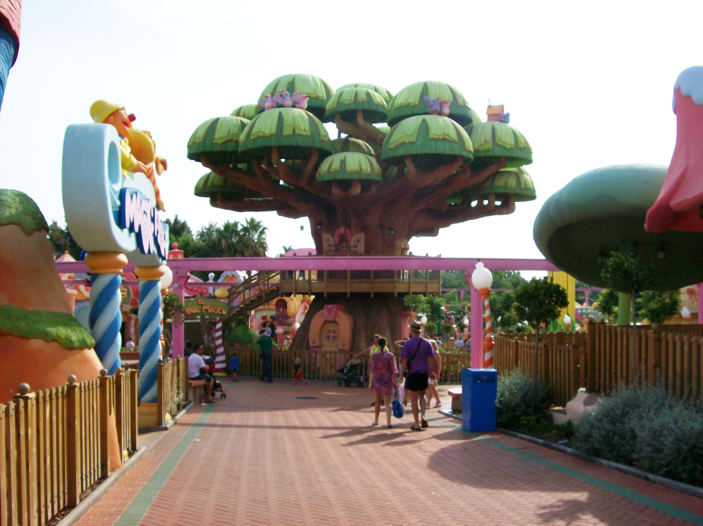 Волшебное дерево страны Сезам